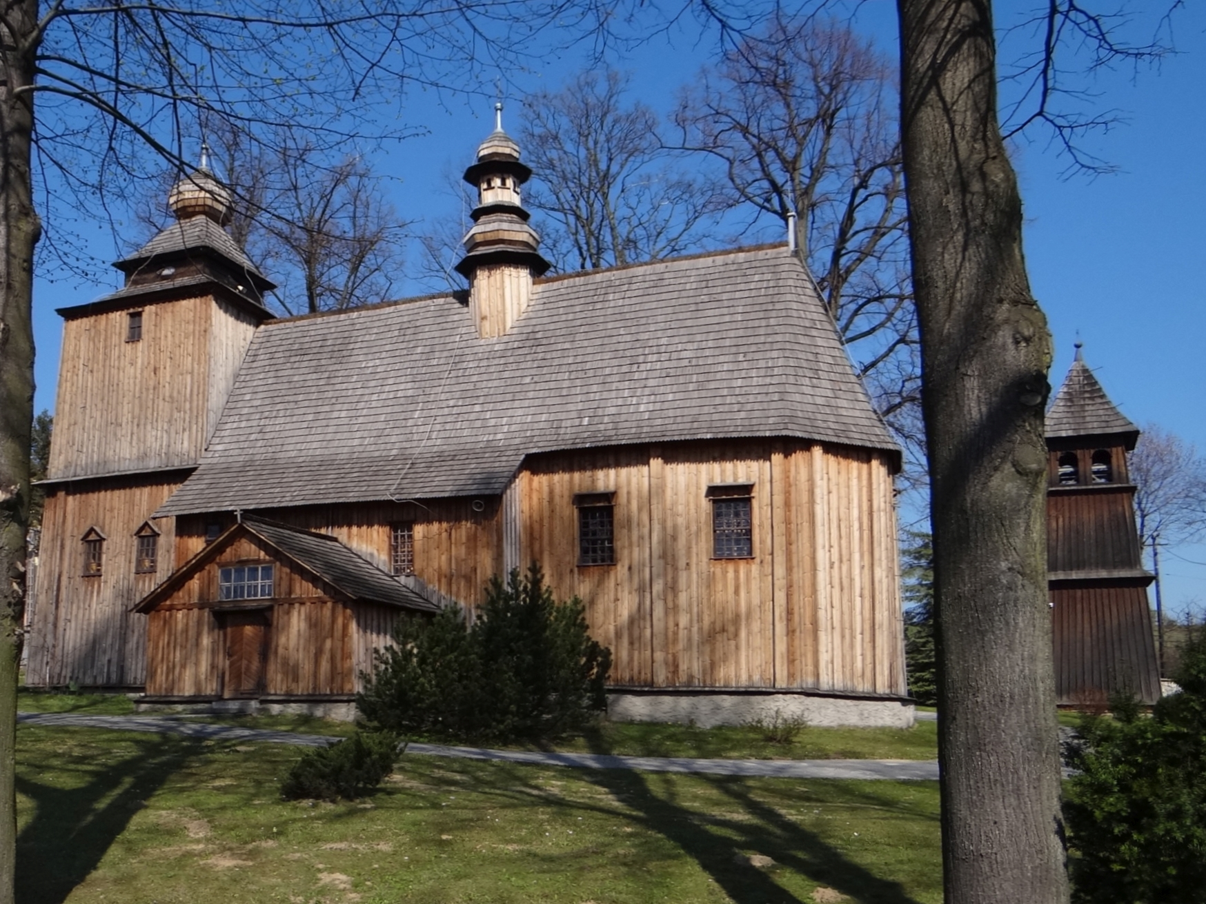 Paczółtowice